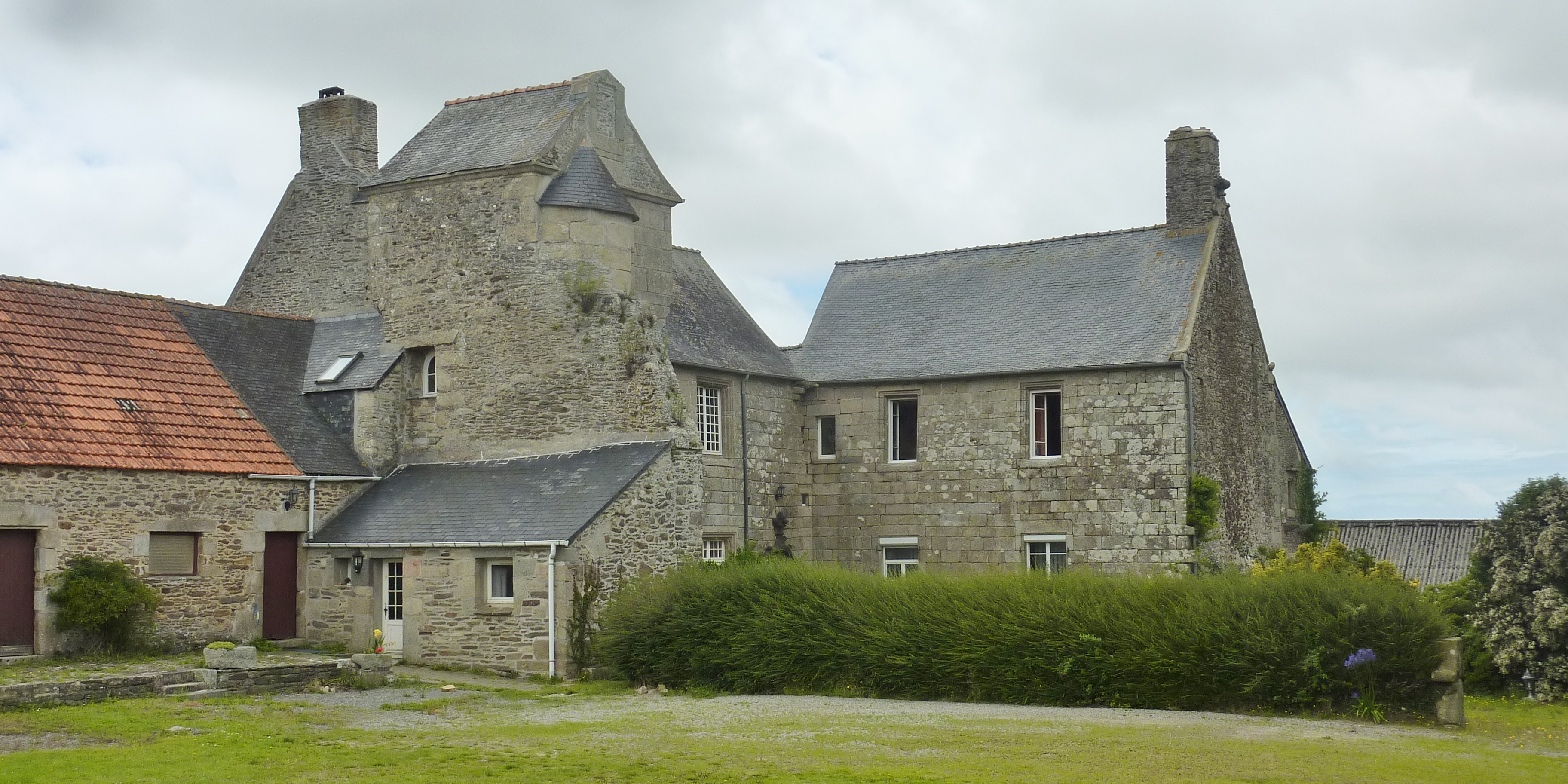 Le Folgoët : le manoir de Guicquelleau (il date du XVe siècle, propriété privée).